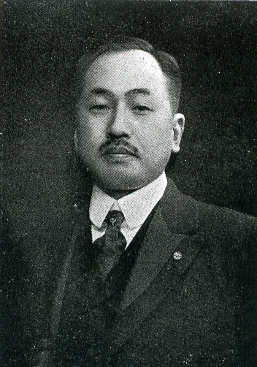 この写真は、田子一民（1881-1963）の写真です。